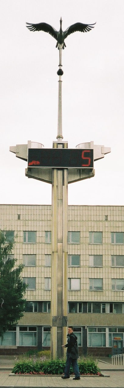 Visaginas - centralny plac miasta, licznik Geigera (lipiec 2004).